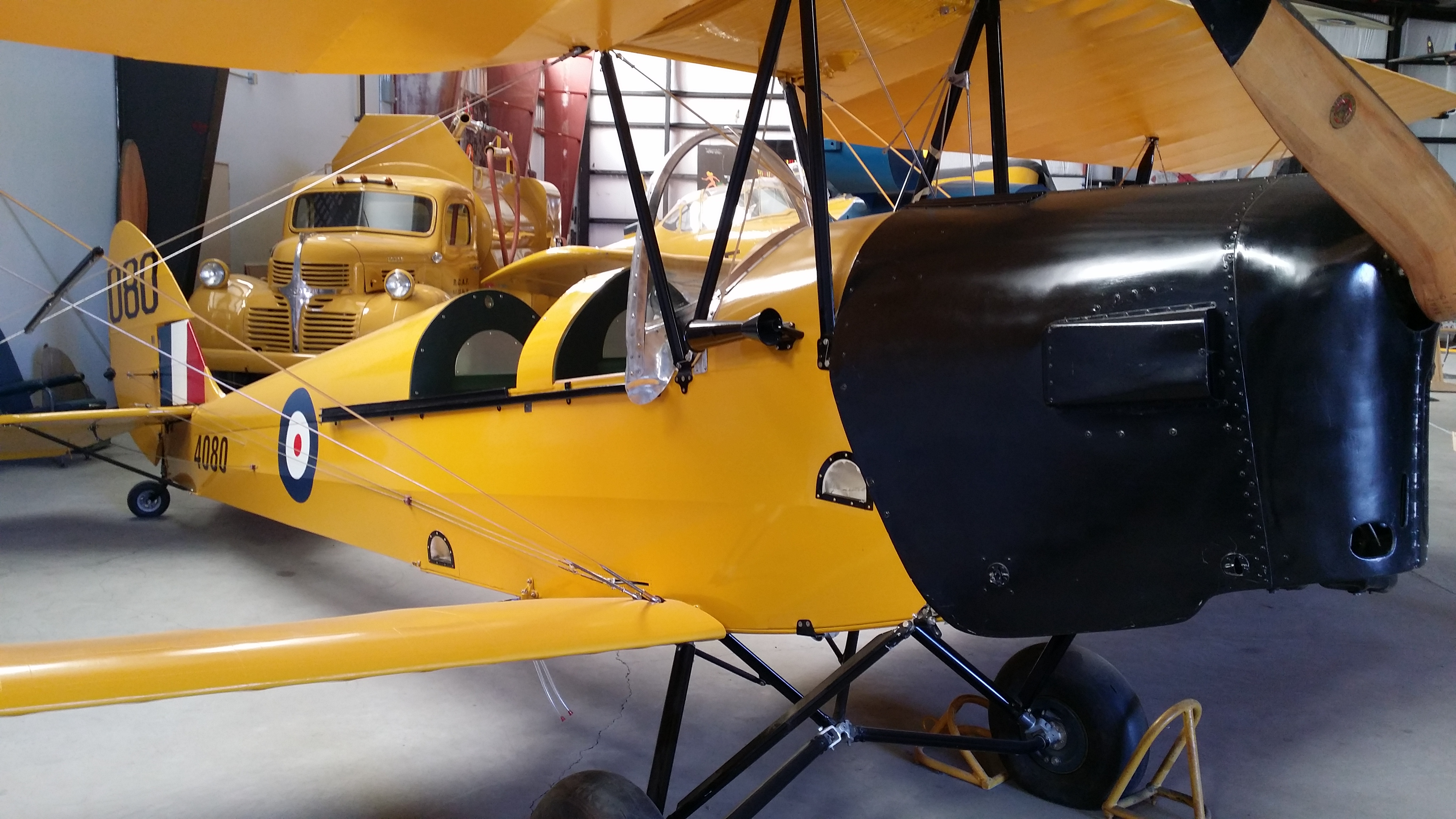 Nanton, AB T0L, Canada